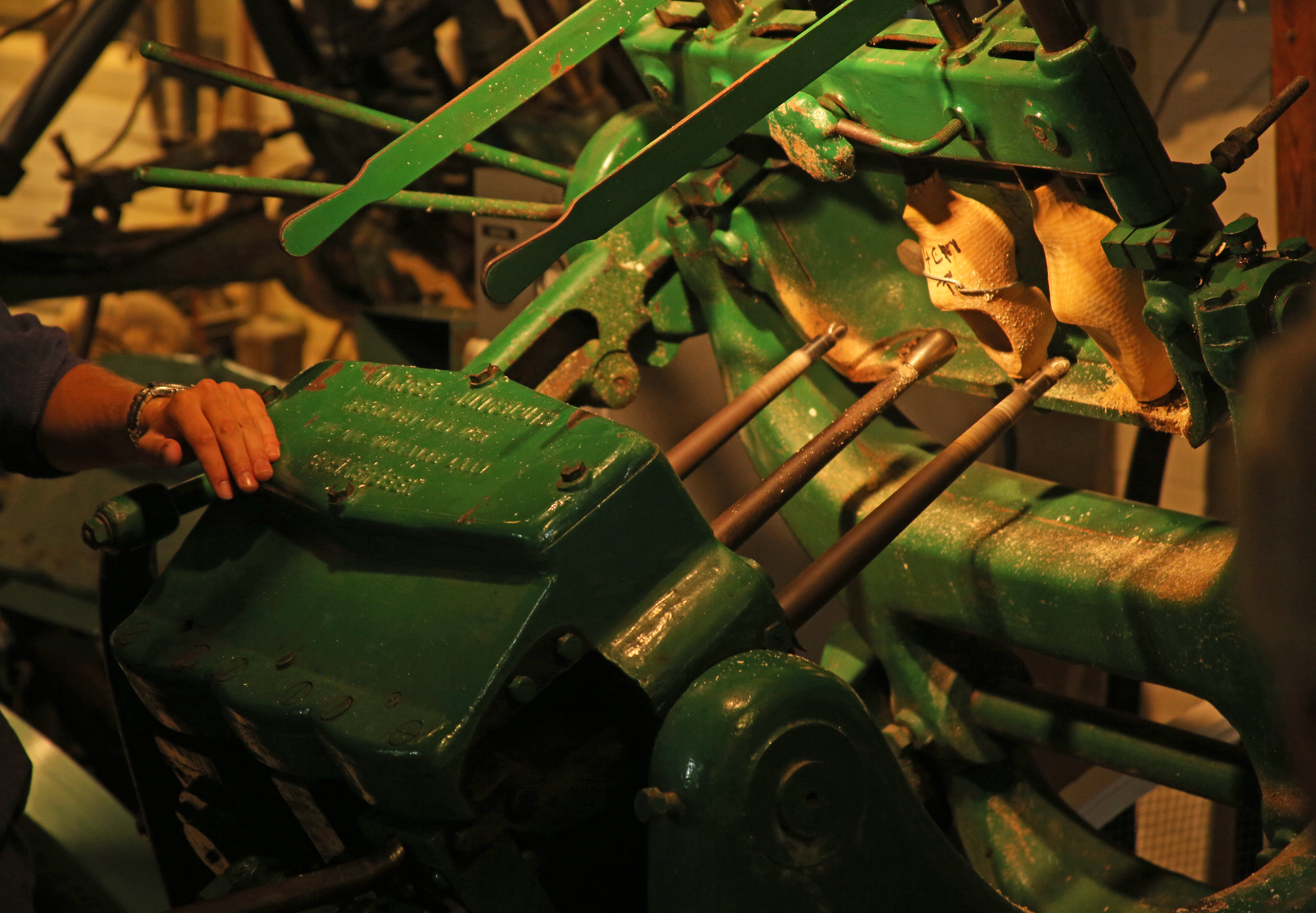 Making Wooden Shoes